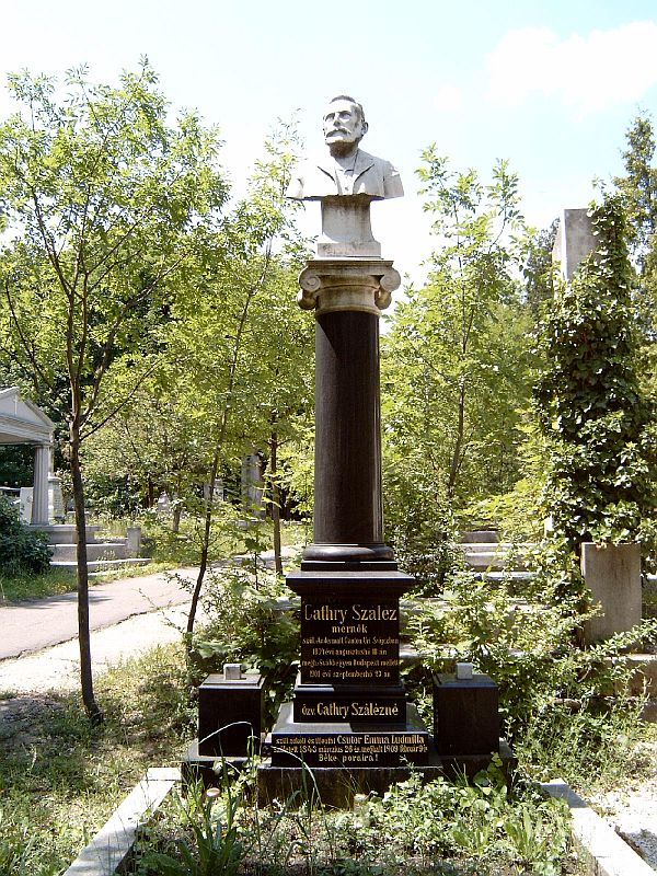 Cathry Szaléz Ferenc (Andermatt, 1834. augusztus 18. – Budapest, 1901. szeptember 13.) svájci származású mérnök, a Budapest-svábhegyi (ma Szabadsághegy) fogaskerekű vasút építőjének sírja Budapesten. Farkasréti temető: 29-1-2. sarok